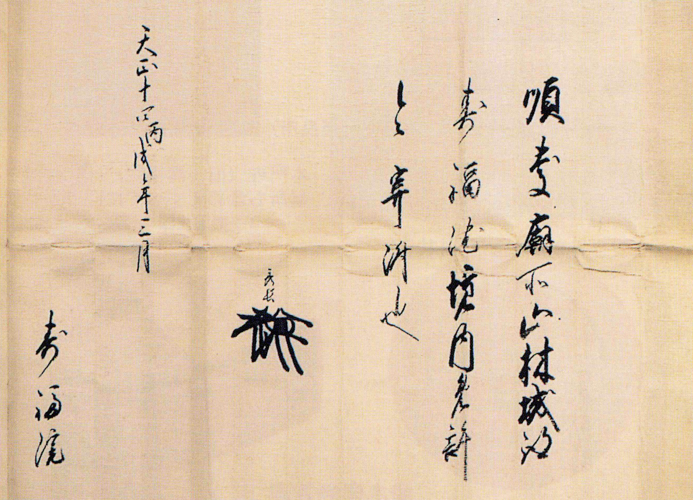 豊臣秀長が壽福院に対して出した書状。天正14年（1586年）3月、筒井順慶の廟所や山林、筒井城の跡地等を壽福院に与える、と記載している。個人蔵。